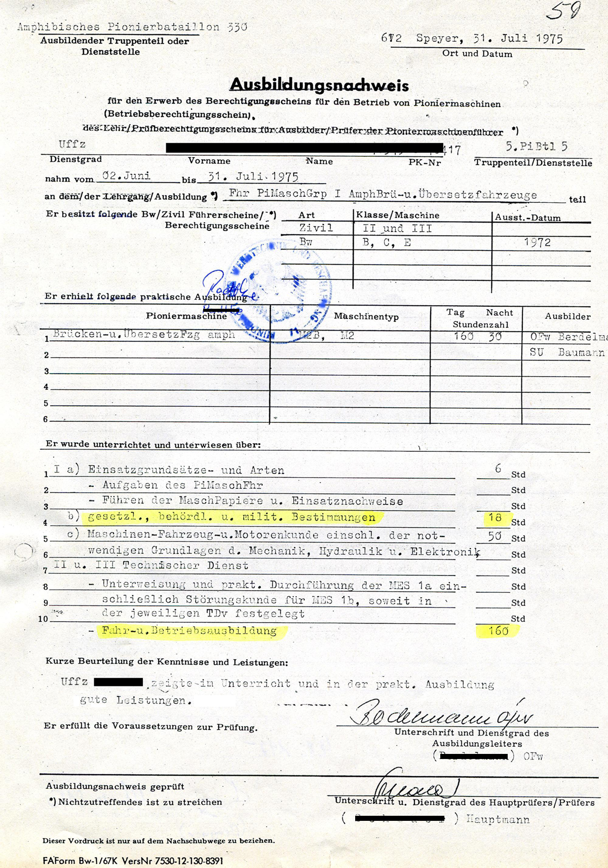 Ausbildungsnachweis